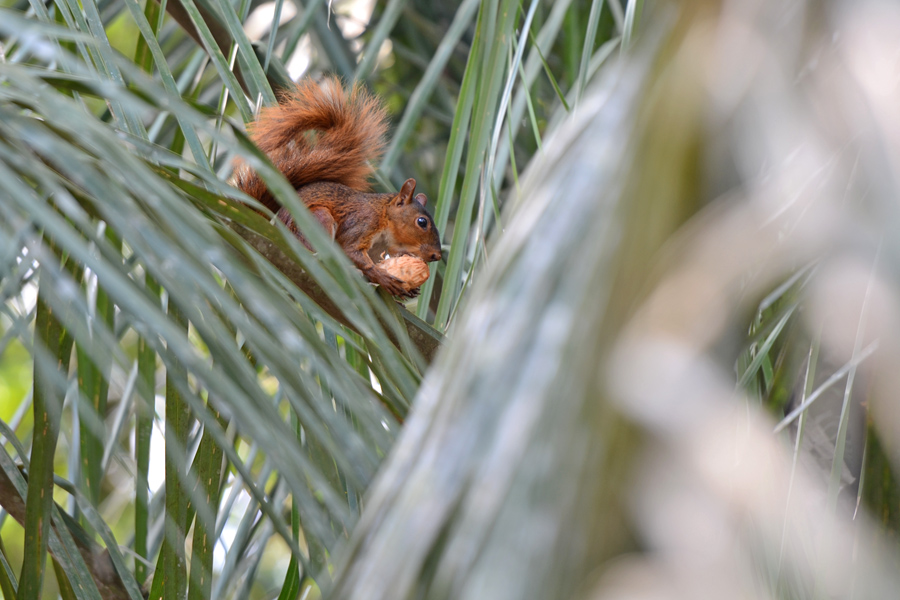 Sciuridae: Sciurus spadiceus